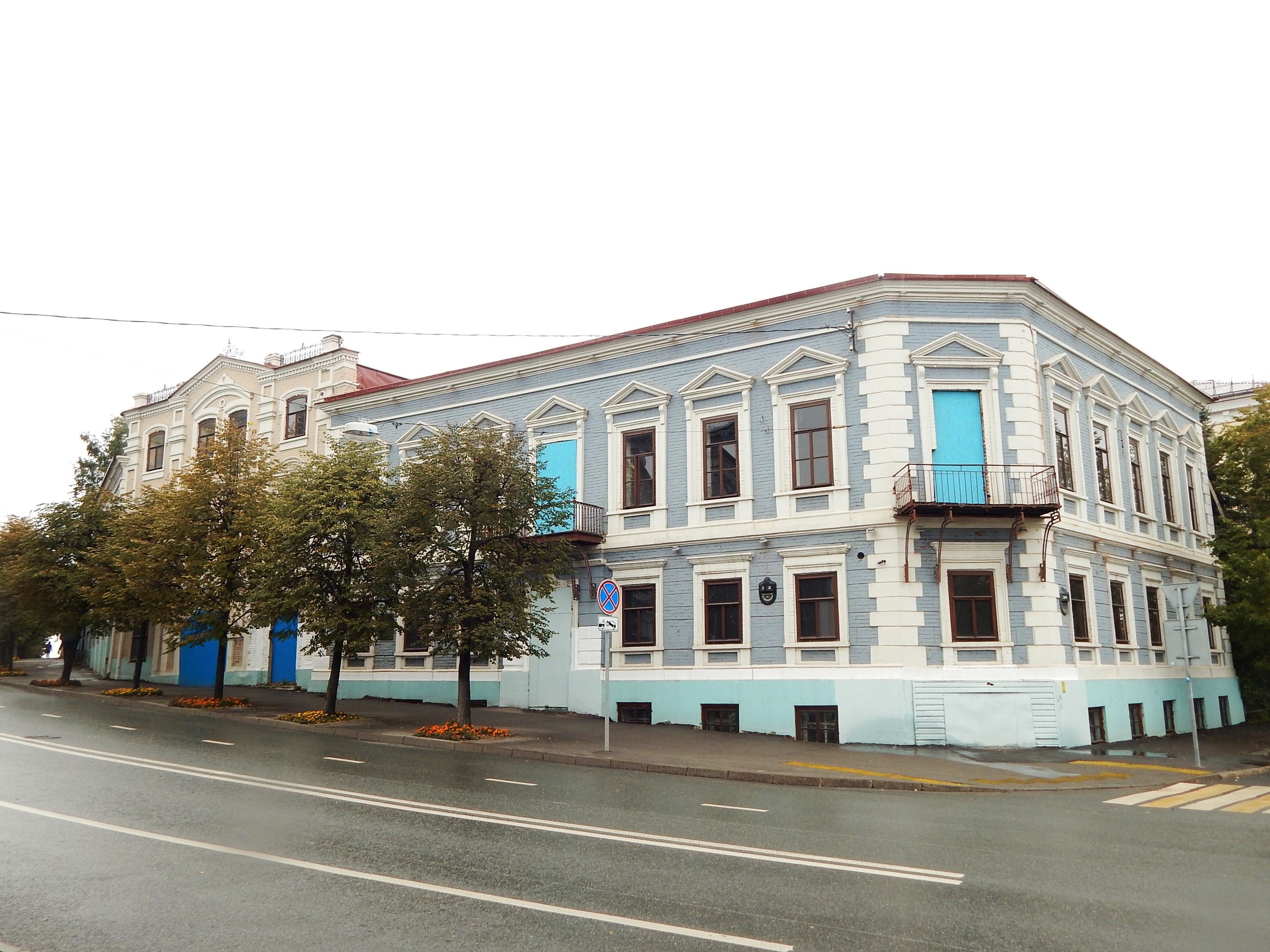 Дом, в котором жил артист В.И. Качалов: улица Дзержинского, 24, Казань, Татарстан